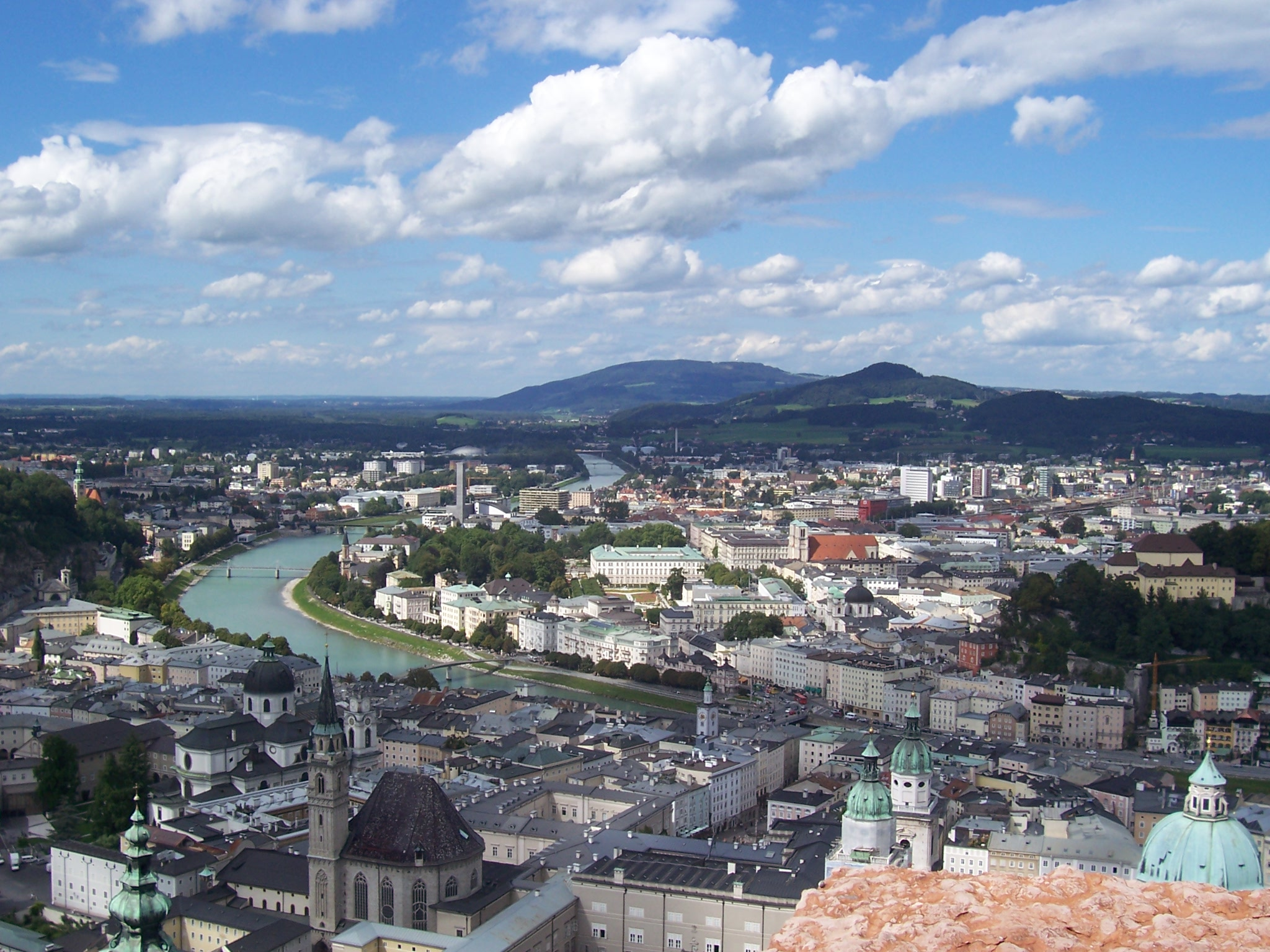 Altstadt von Salzburg von der Festung Hohensalzburg aus gesehen, links die Franziskanerkirche